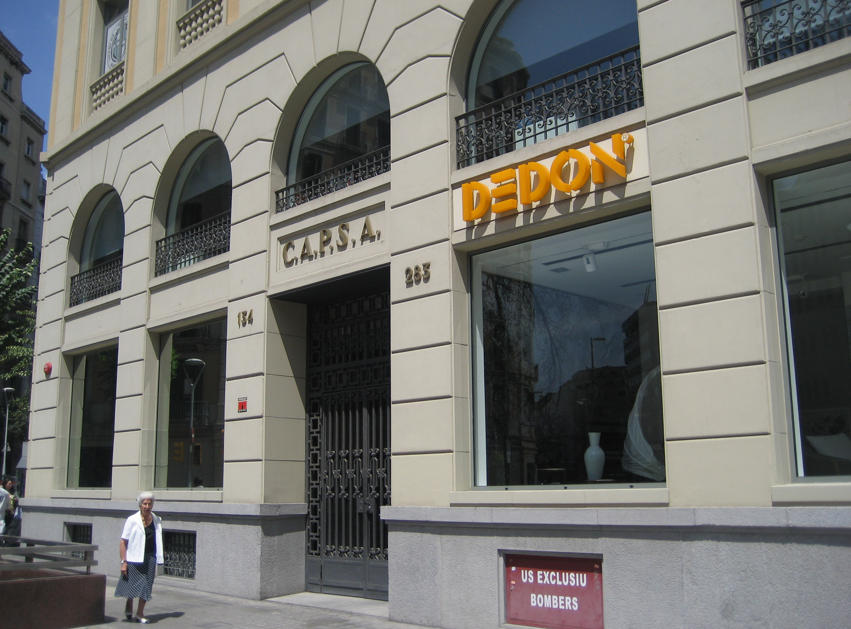 Façana del que fou Teatre CAPSA en el núm. 134 del carrer Pau Claris de Barcelona